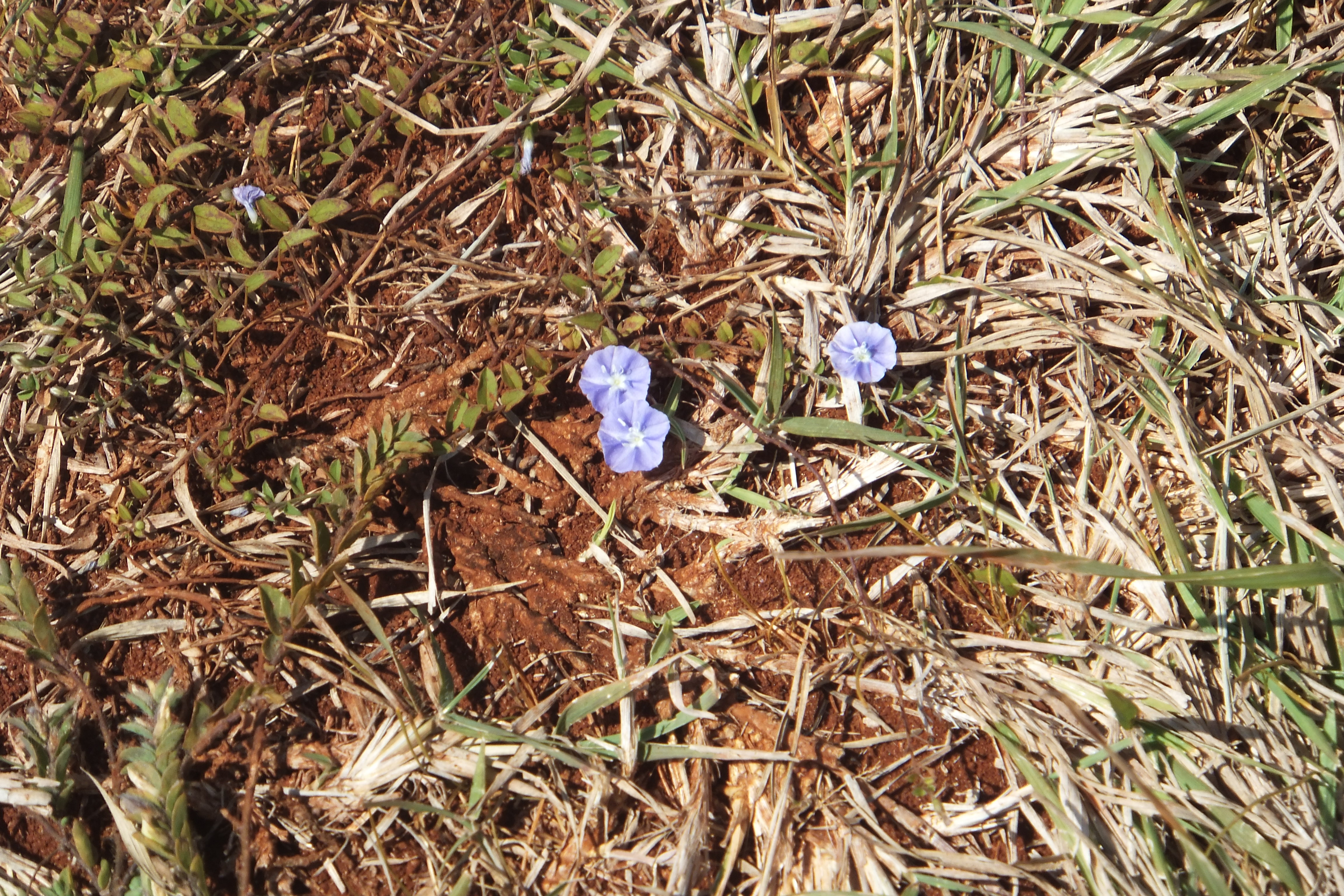 සිංහල: උස්සංගොඩ ශාක